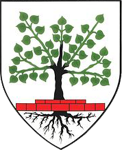 Wappen von Gersfeld (Rhön)